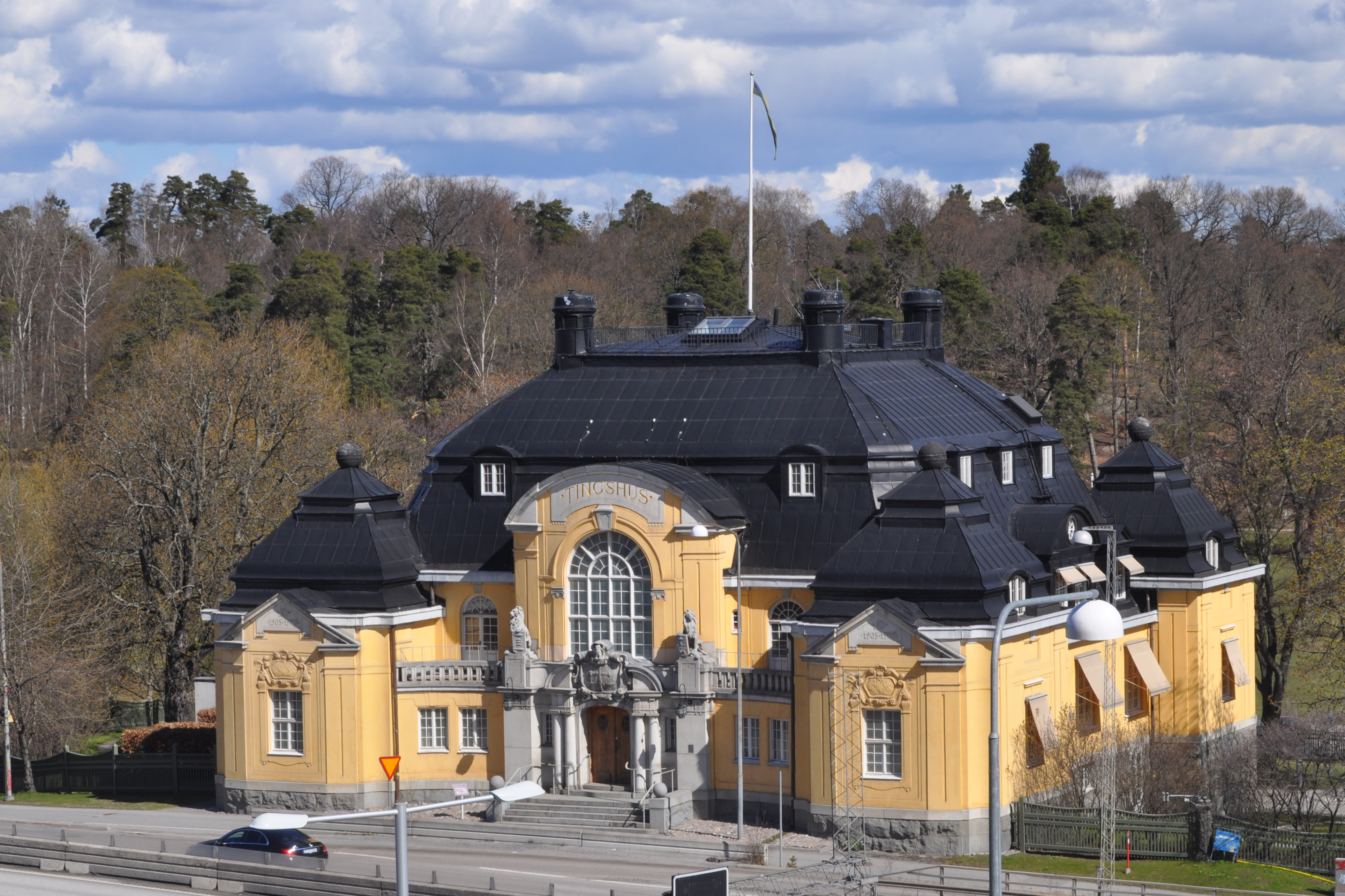 Haga tingshus, invigt 1907 för Sollentuna och Färentuna domsagas samt Södra Roslags domsagas häradsrätter. Arkitekter Ullrich & Hallquisth.